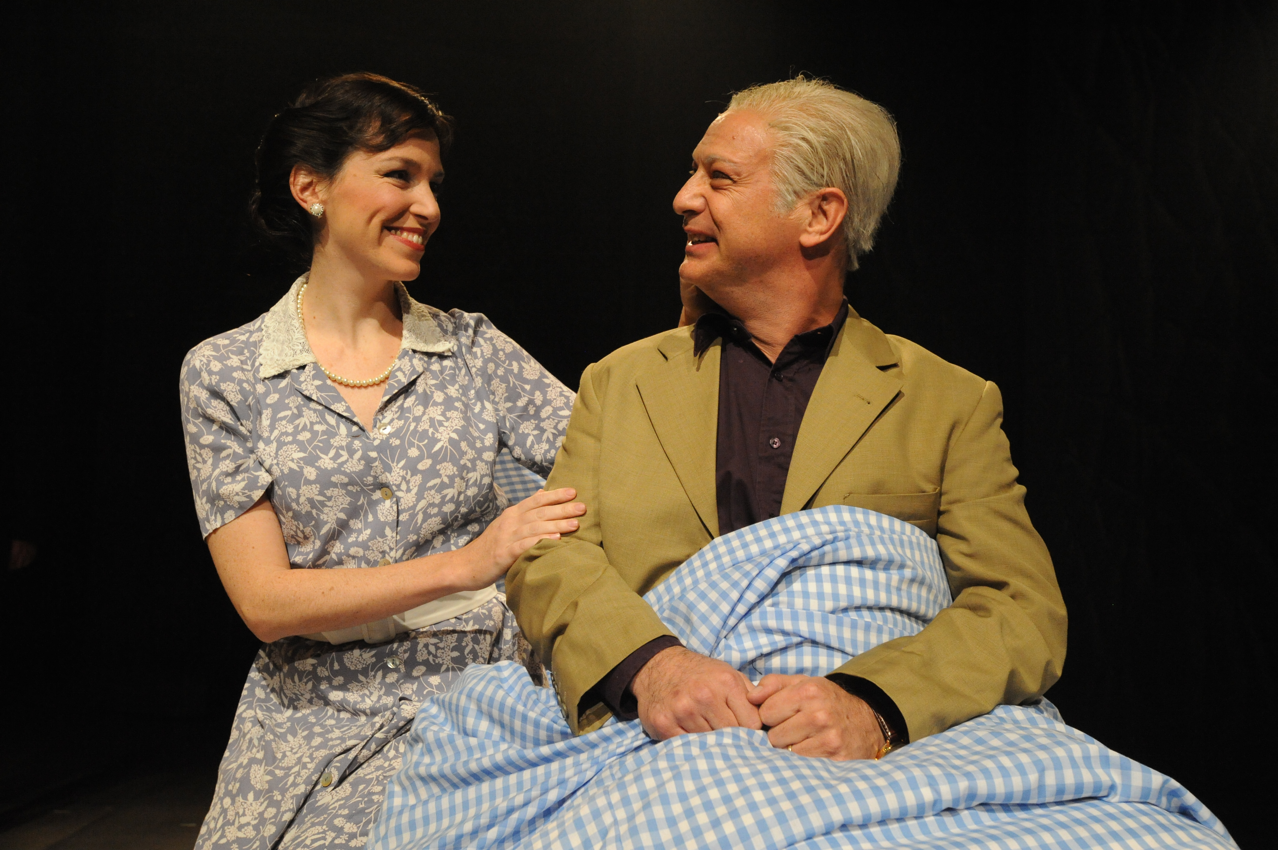 ארז שפריר ושרון שטרק ב"אהובת הדרקון", מאת ובבימויו של מיקי גורביץ', תיאטרון החאן